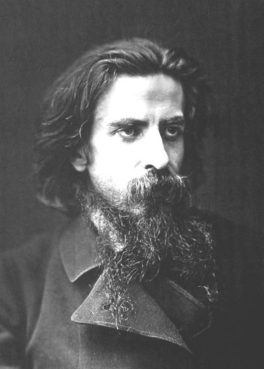 Русский философ-мистик Владимир Сергеевич Соловьёв (1853-1900)